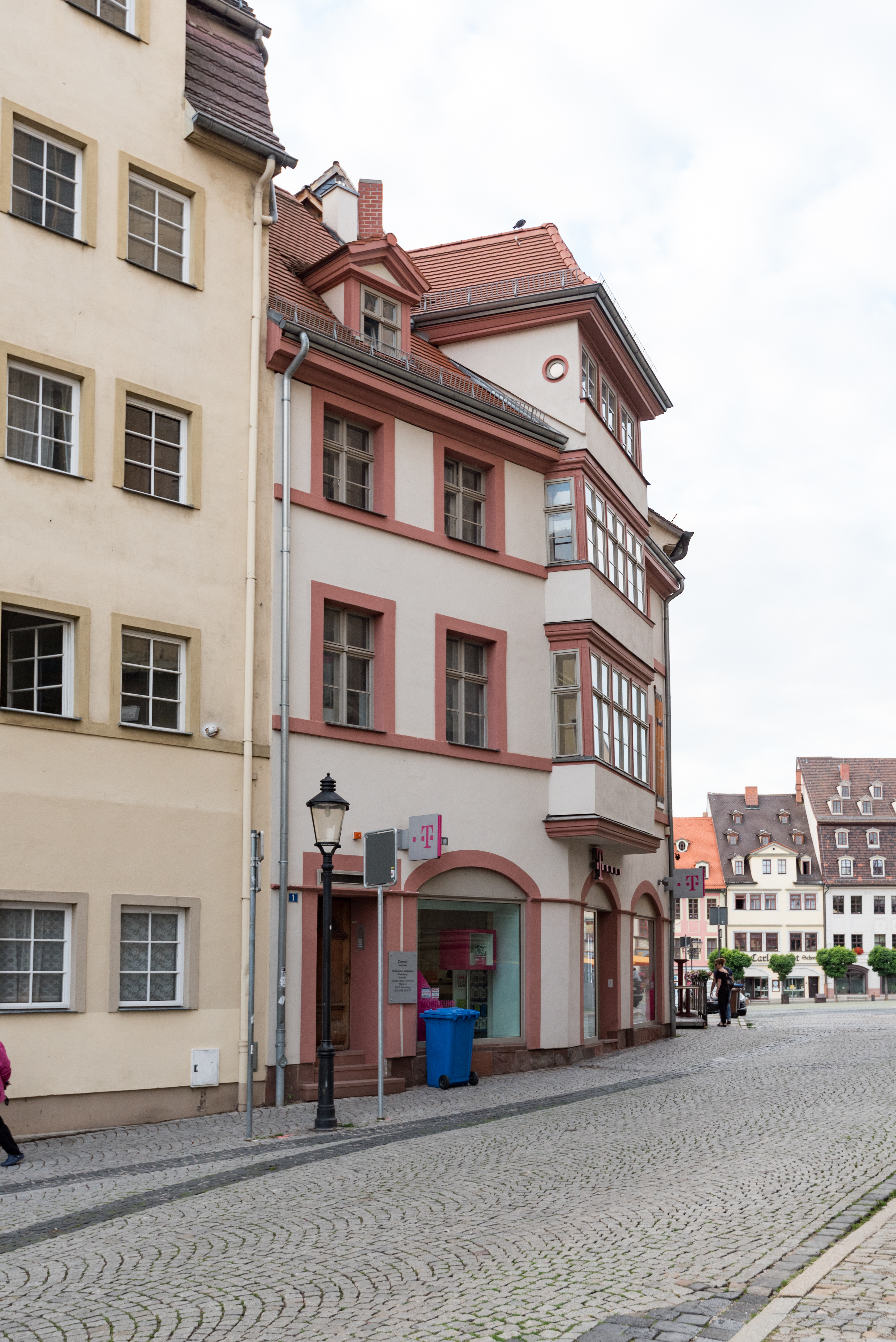 Naumburg (Saale), Topfmarkt 1